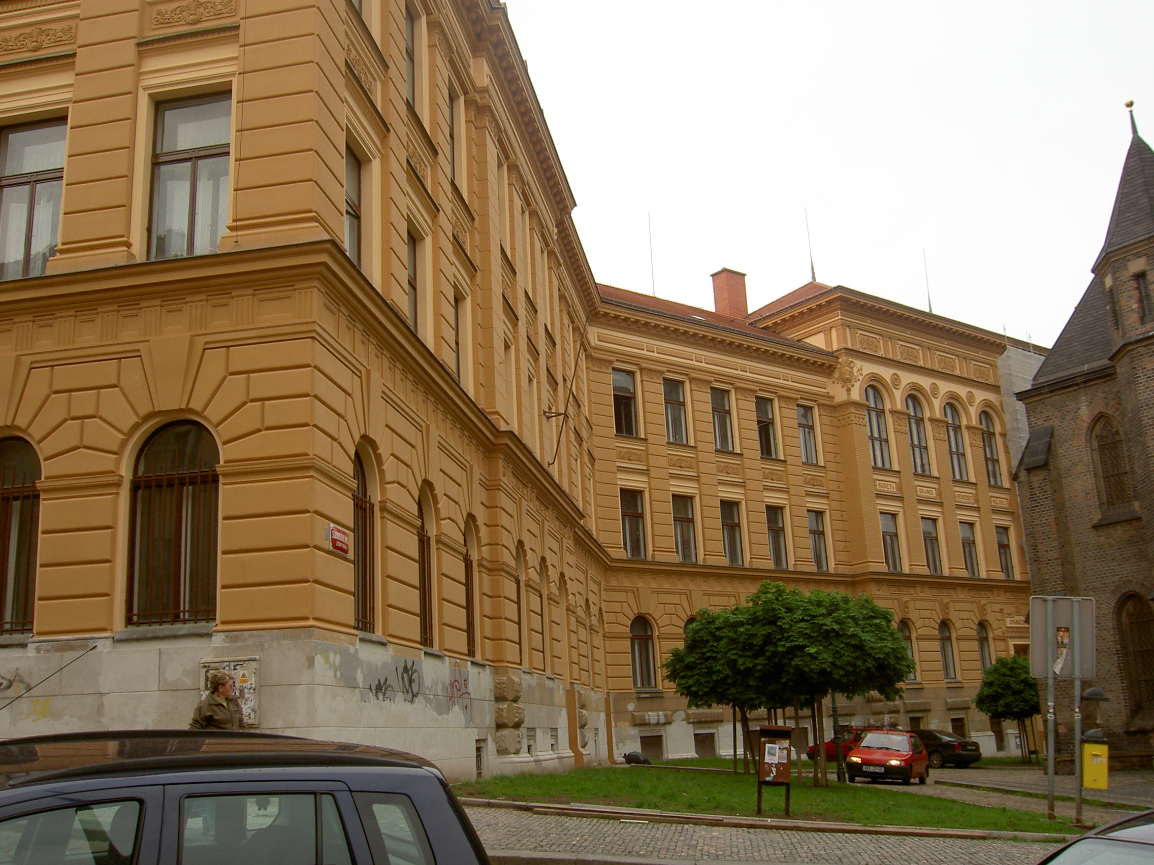 Budova Gymnázia Sladkovského náměstí 8 nově přejmenovaného na Gymnázium Karla Sladkovského